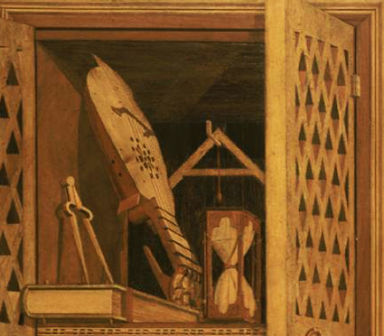 Studiolo di Gubbio, attribué à Francesco di Giorgio que fit construire Federico da Montefeltro (Metropolitan Museum di New York)